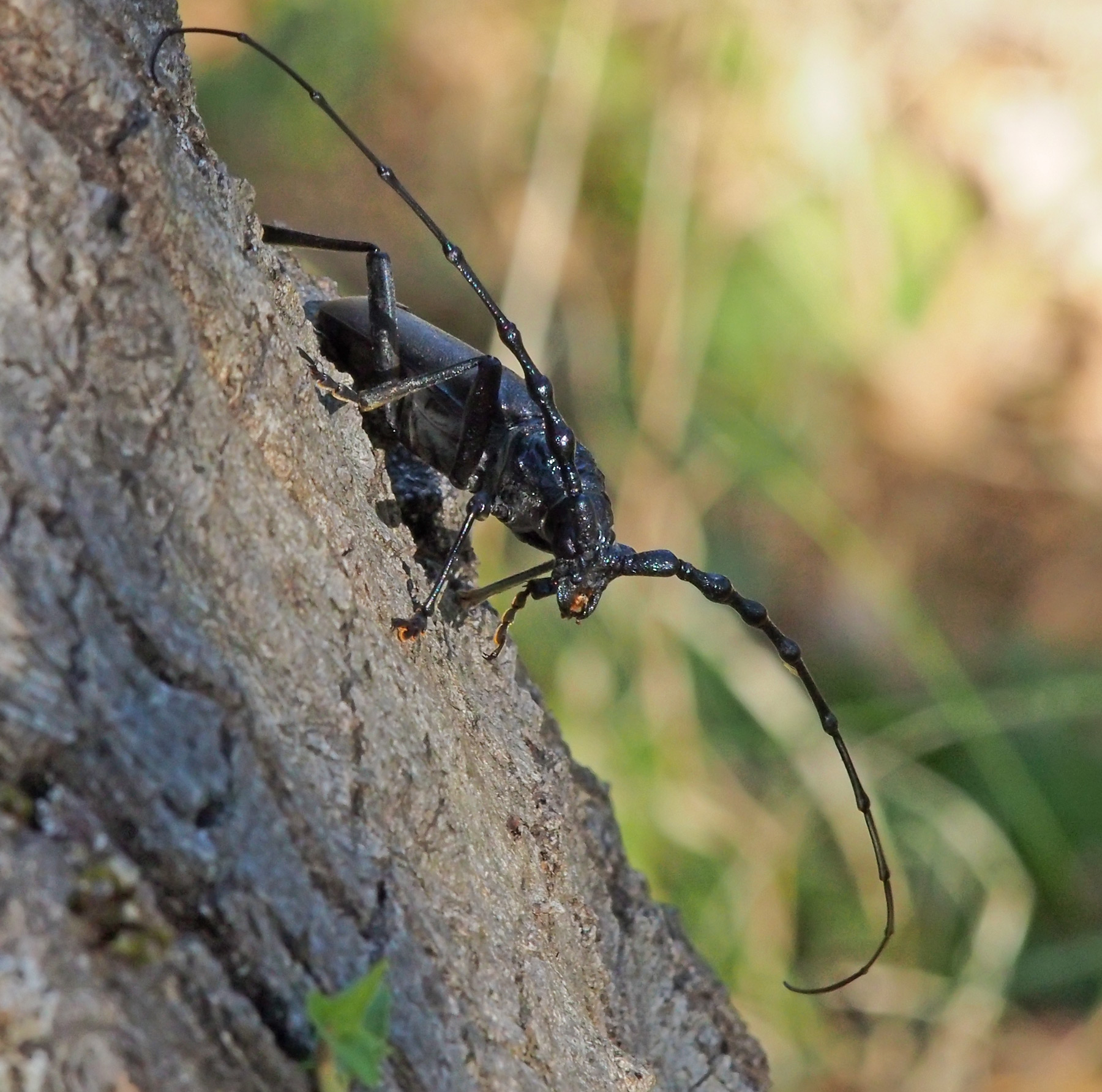 Cerambyx cerdo, macho, sobre corteza de Quercus pyrenaica. Losar de la Vera (Cáceres, España).